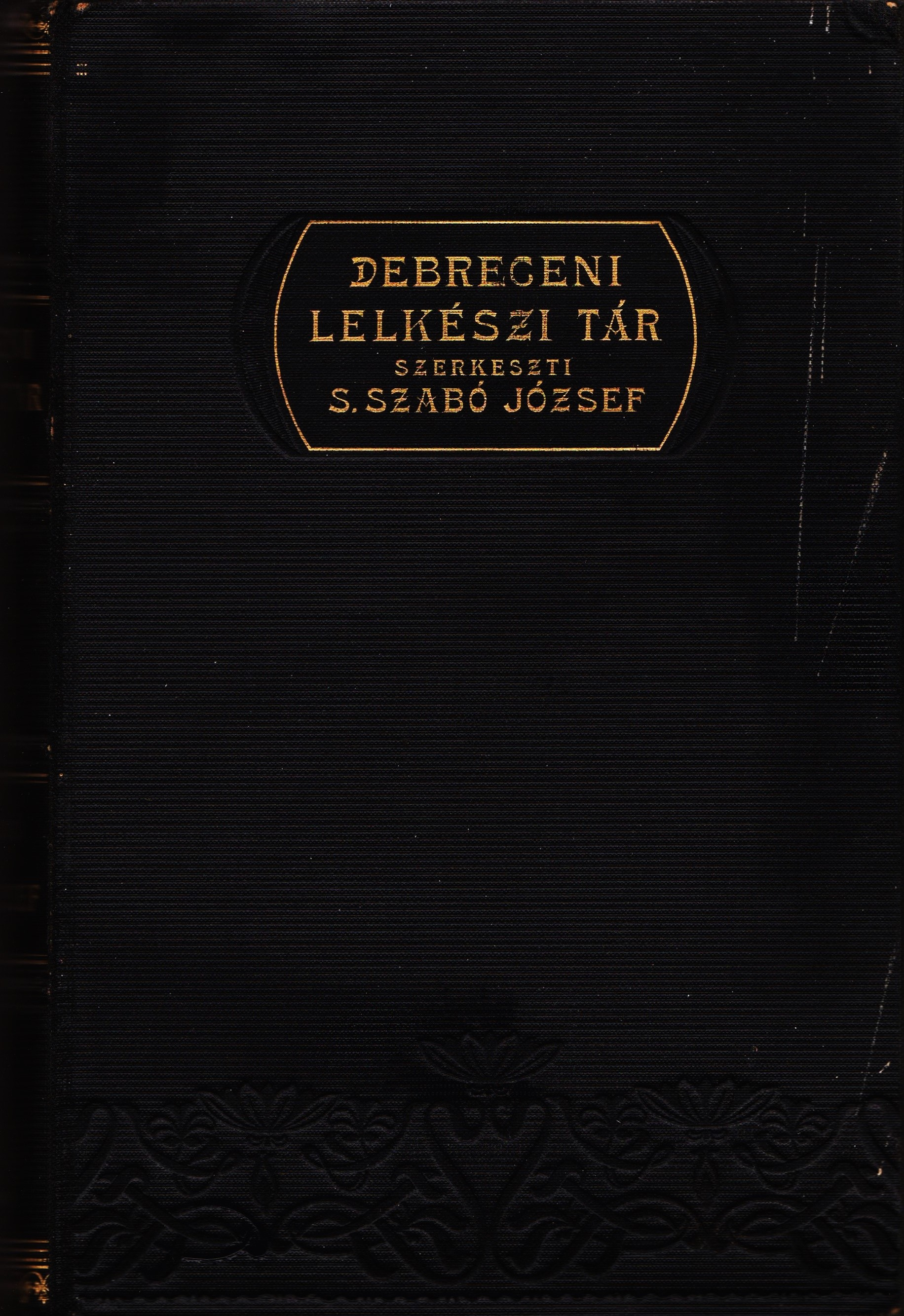 Debreczeni lelkészi tár, VII. kötet